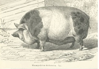 Hampshireschwein